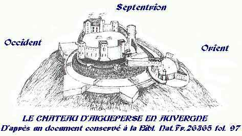 Gravure du château de Montpensier, d'après un document conservé à la bibliothèque nationale de France